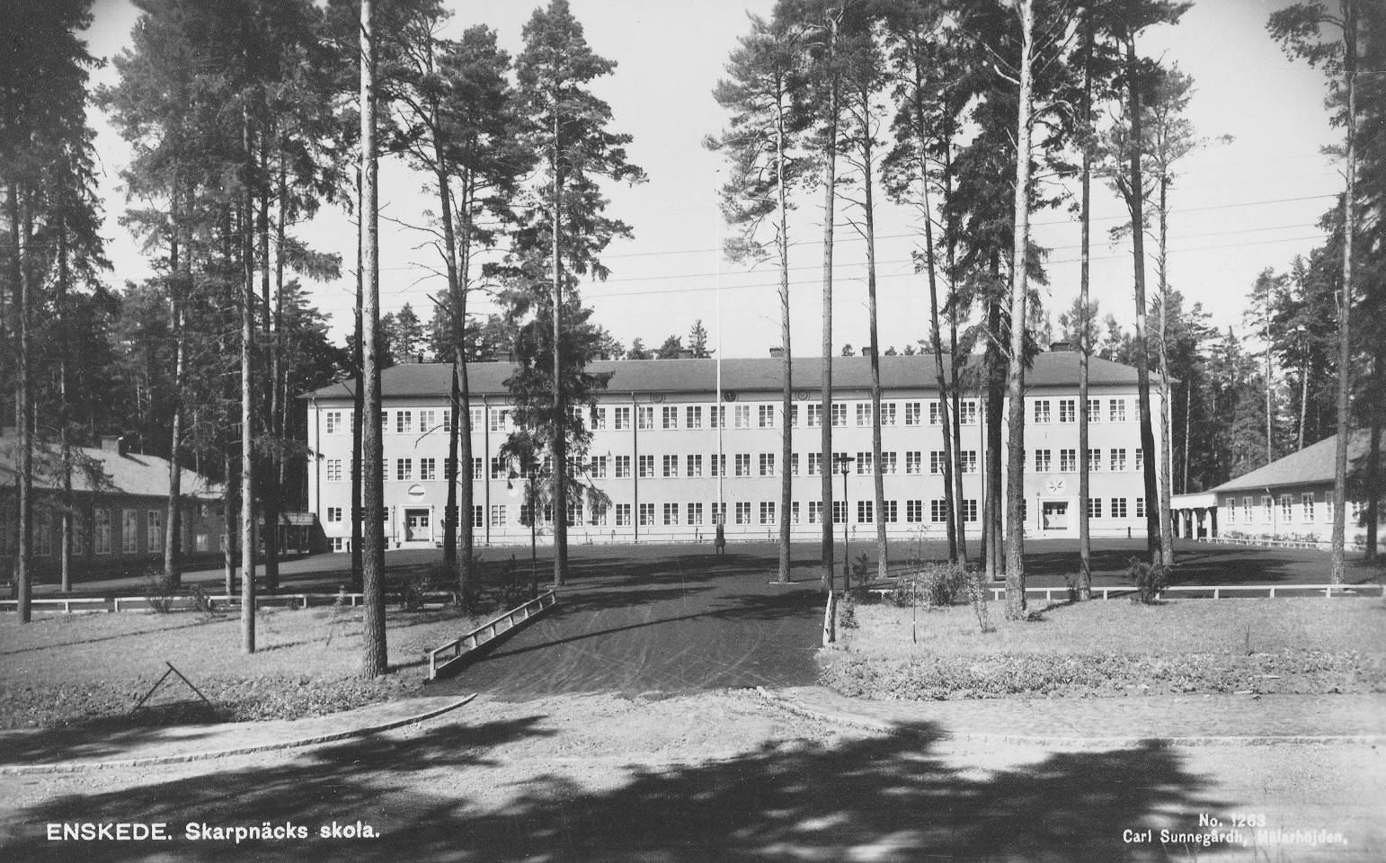 Skarpnäcks gamla skola (f.d. Skarpnäcks skola i Enskede), arkitekt Georg A. Nilsson